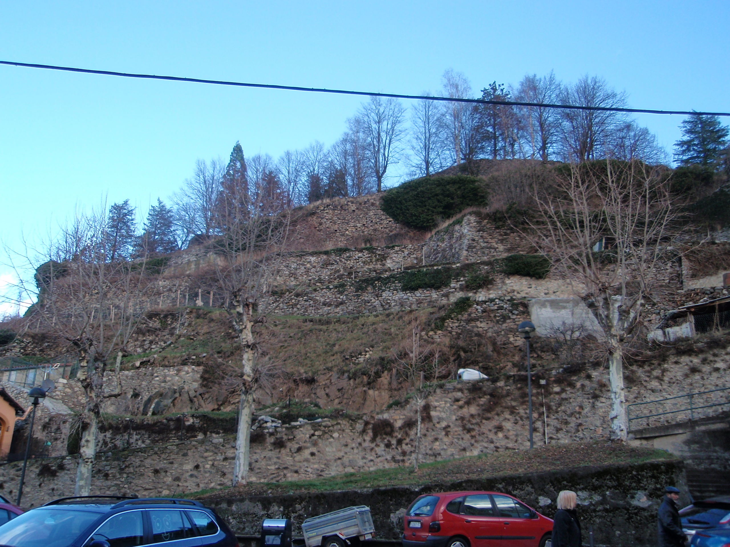 Castell de Camprodon muralles i baluards del costat oest vist des de sota, al costat de l'antic carrer major del poble